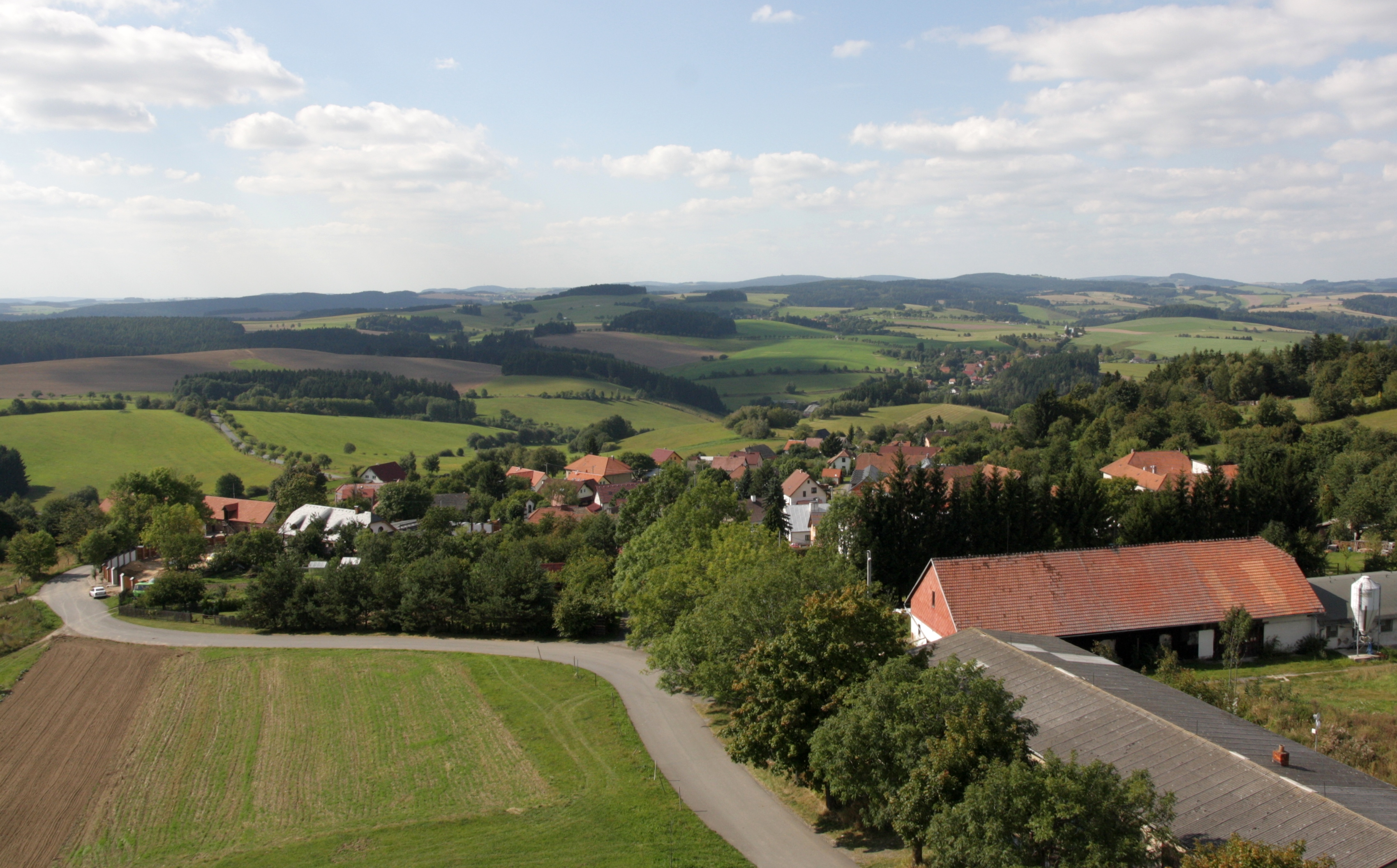 Pohled na vesnici Karasín z karasínské rozhledny.